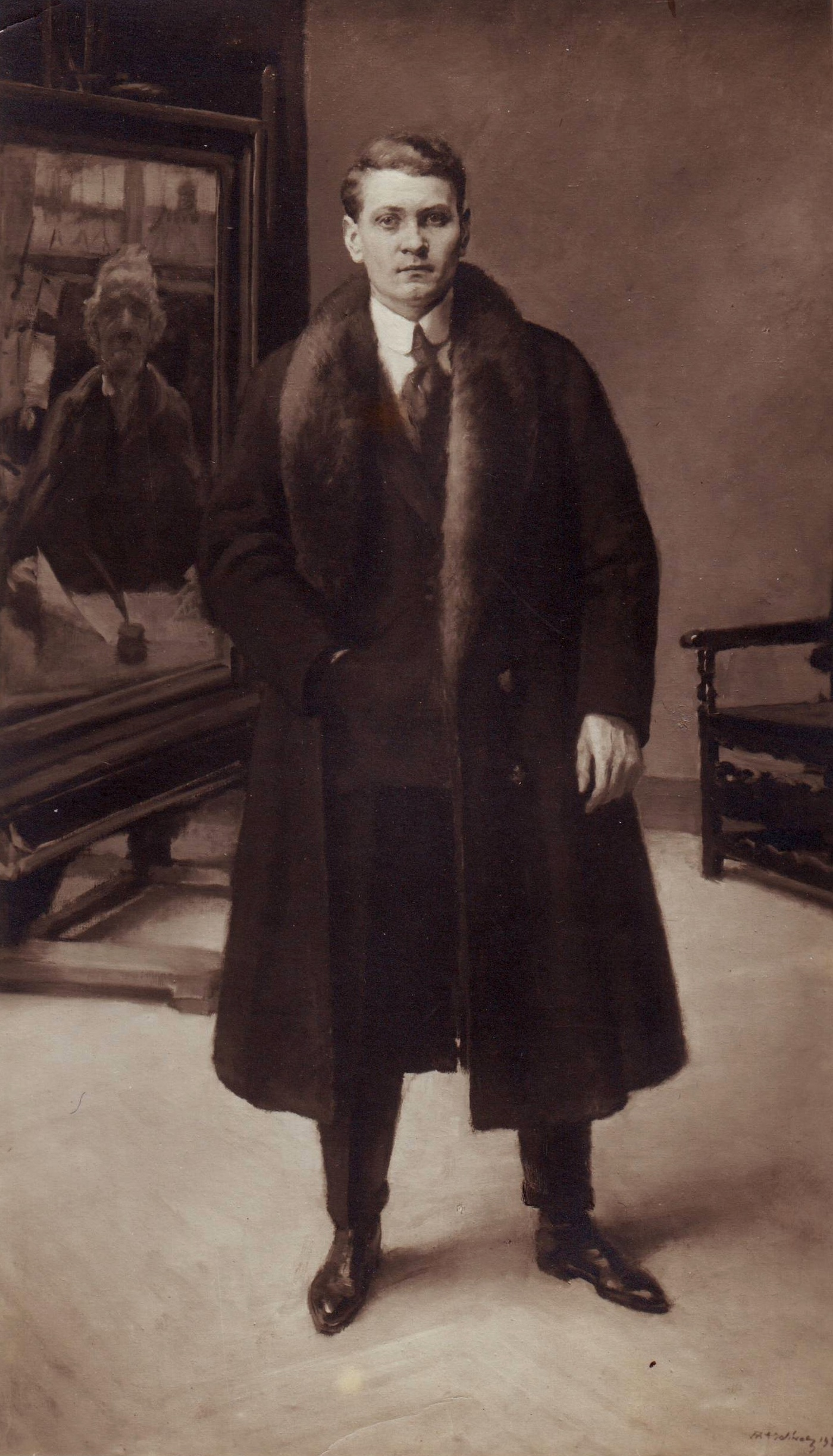 fotografie obrazu .A.Jelínka s názvem "Autoportrét"